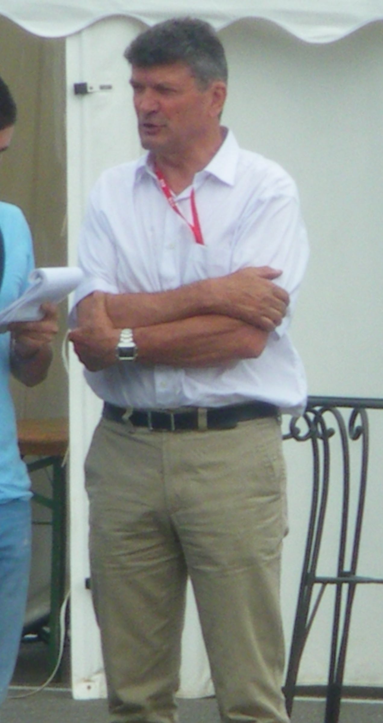 Bernard Thévenet à village de départ de la 3ème étape du Dauphiné Libéré 2010 : Monteux - Sorgues.